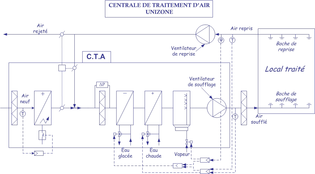 Schéma d'une centrale de traitement d'air Unizones